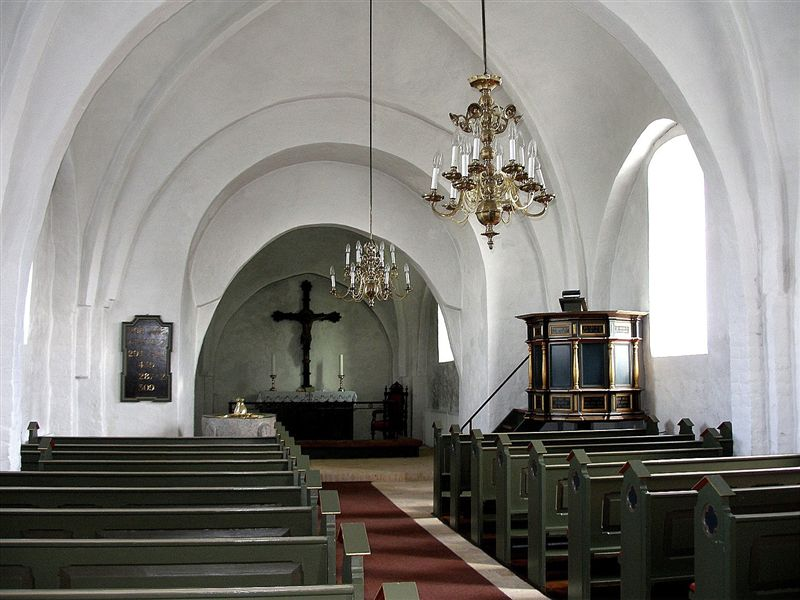 Blenstrup Kirke i Danmark. Skibet set mod øst